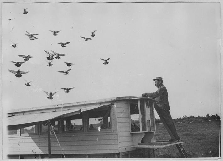 par le service photographique de l'armée d'orient, France.